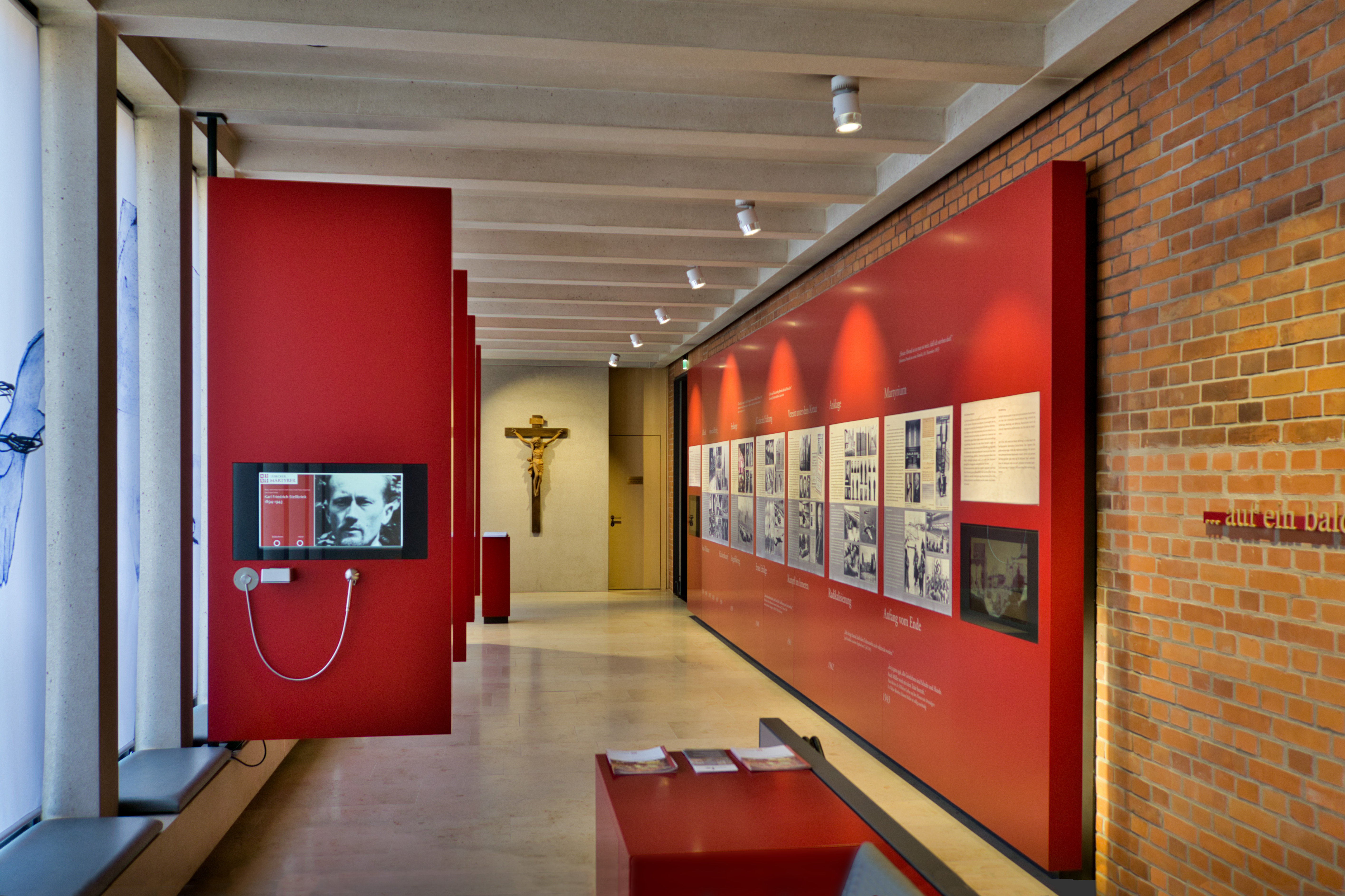 Blick in die Gedenkstätte für die Lübecker Märtyrer, Anbau der katholischen Herz-Jesu-Kirche in Lübeck